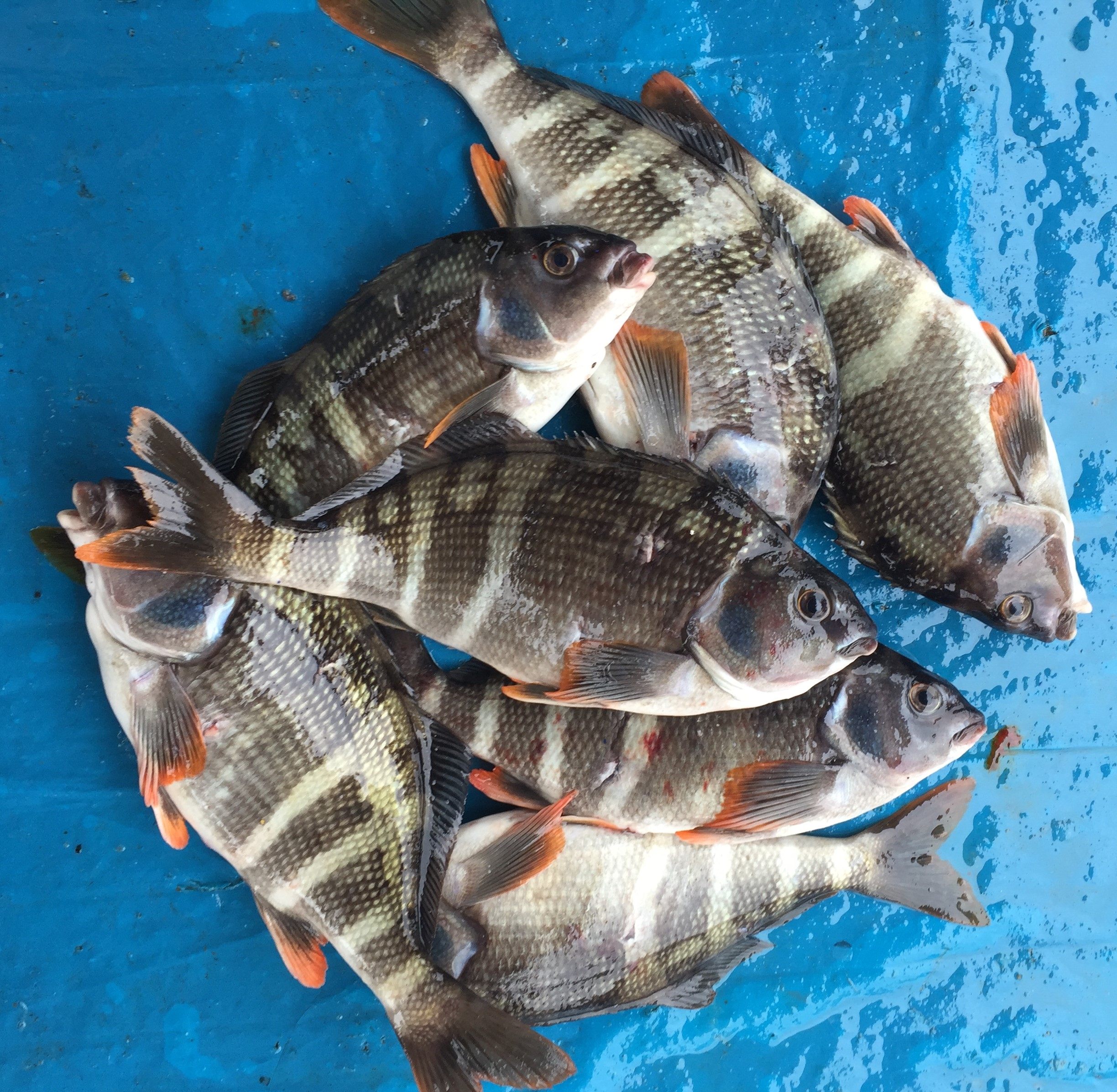 Ejemplares de pintadilla (Cheilodactylus variegatus) en el puerto de Ancón (Perú)